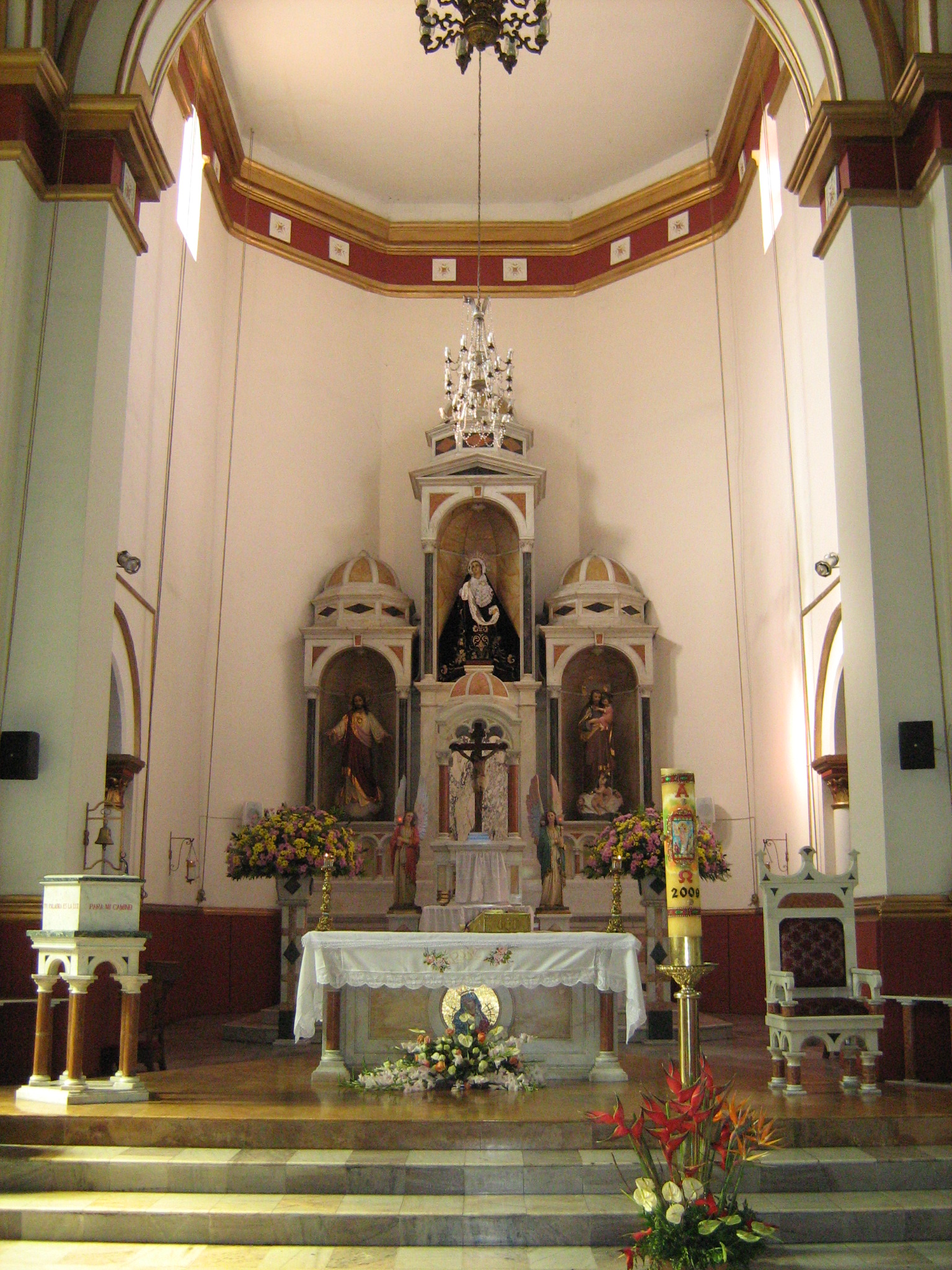 Iglesia de Nuestra Señora de los Dolores, Barrio La América, Medellín, Colombia.